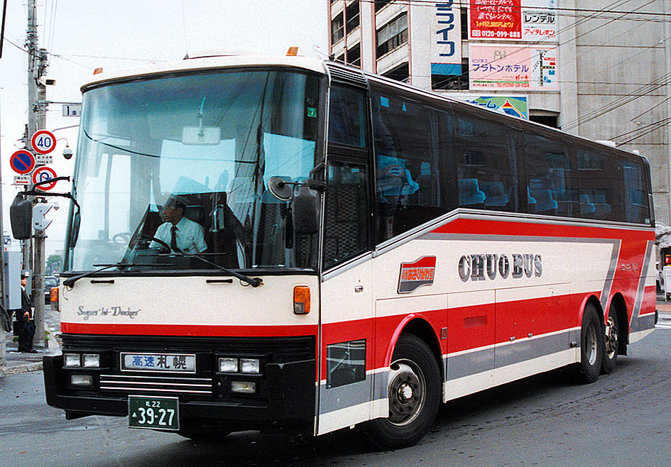 北海道中央バス 高速あさひかわ号 日産ディーゼル P-DA66U